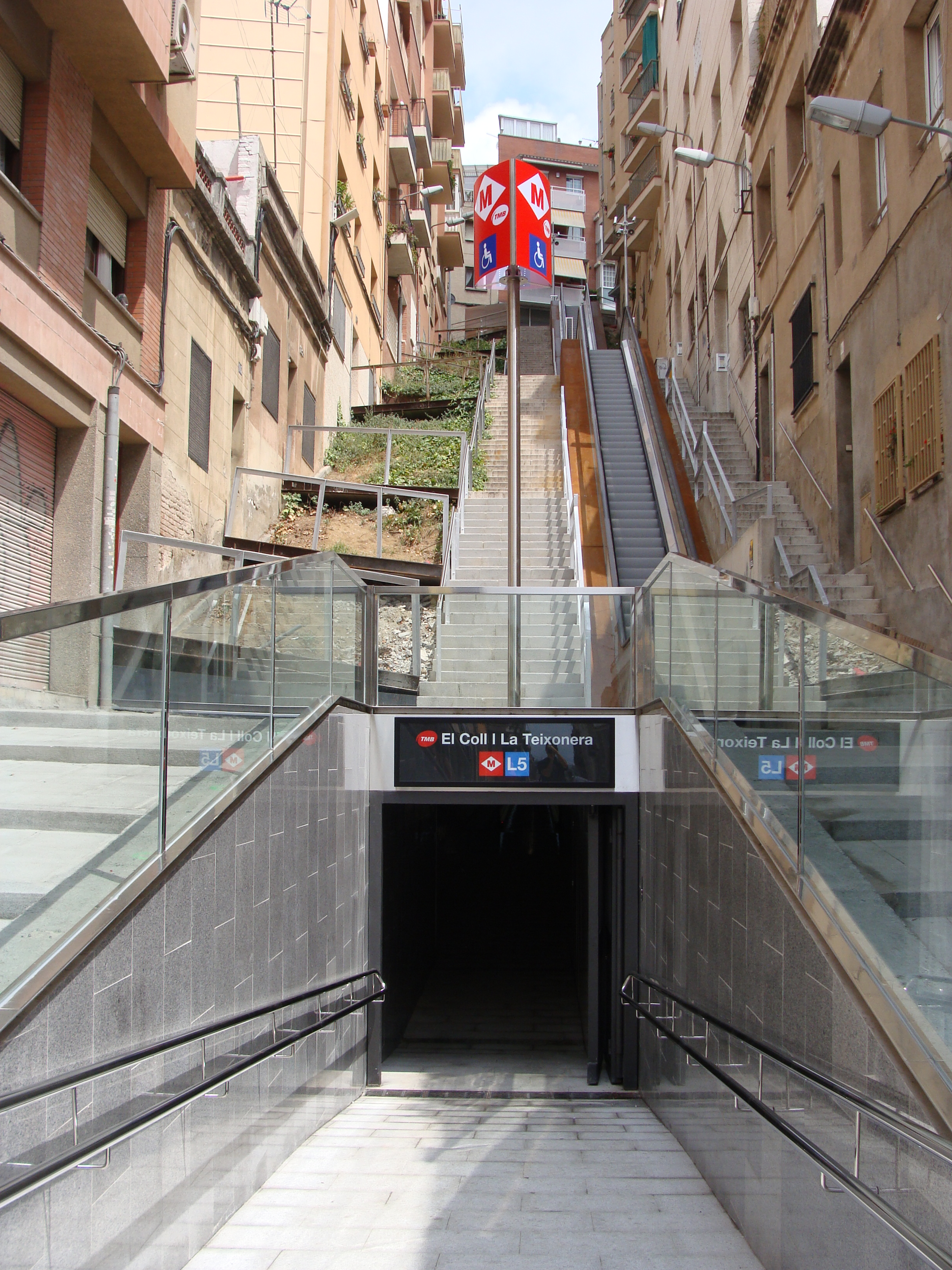 Accès a l'estació de la L5 El Coll - La Teixonera pel carrer Beat Almató, El Coll, Barcelona.